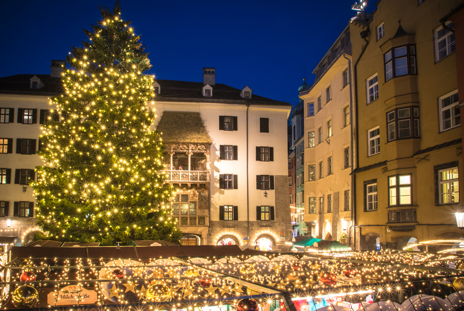 Ansitz Neuhof, Goldenes Dachl